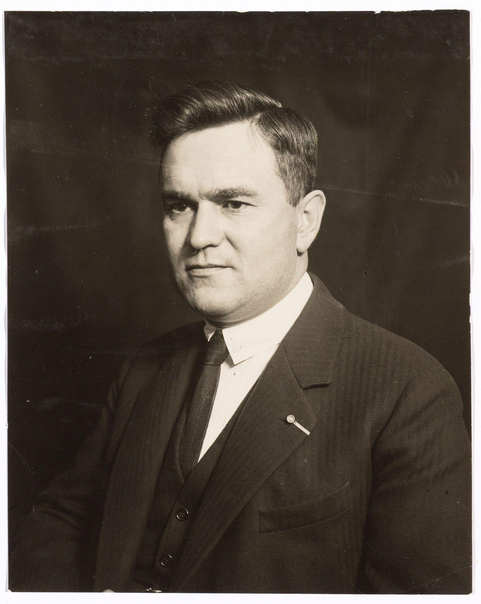 Karel Henri Broekhoff (1886-1946); Hoofdcommissaris van politie te Amsterdam 1945-1946/ Chief Constable of the Amsterdam Police 1945-1946